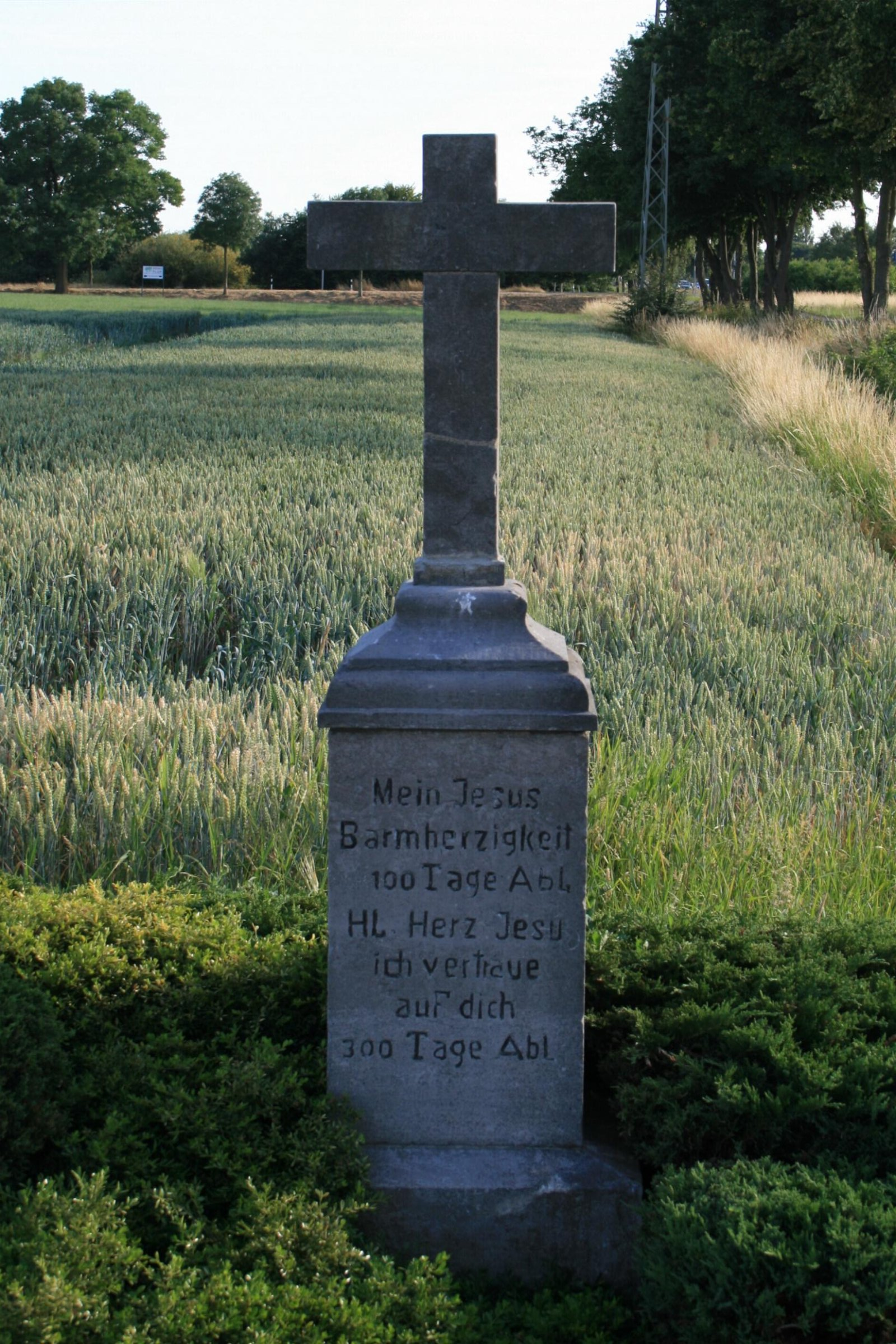 Denkmal in Mönchengladbach Wegekreuz, Erkelenzer Straße in MG-Schriefers